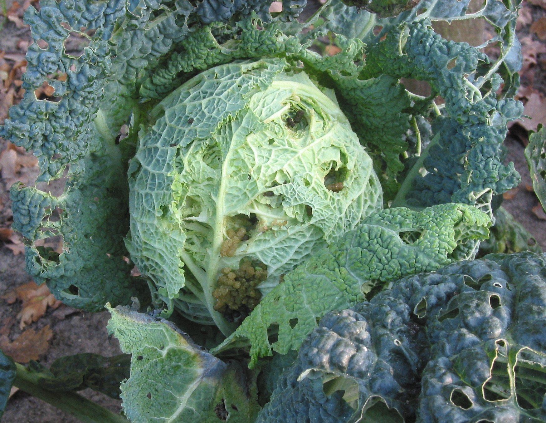 (nl: Groene savooiekool schade van kooluil) Mamestra brassicae damage on Brassica oleracea convar. capitata var. sabauda